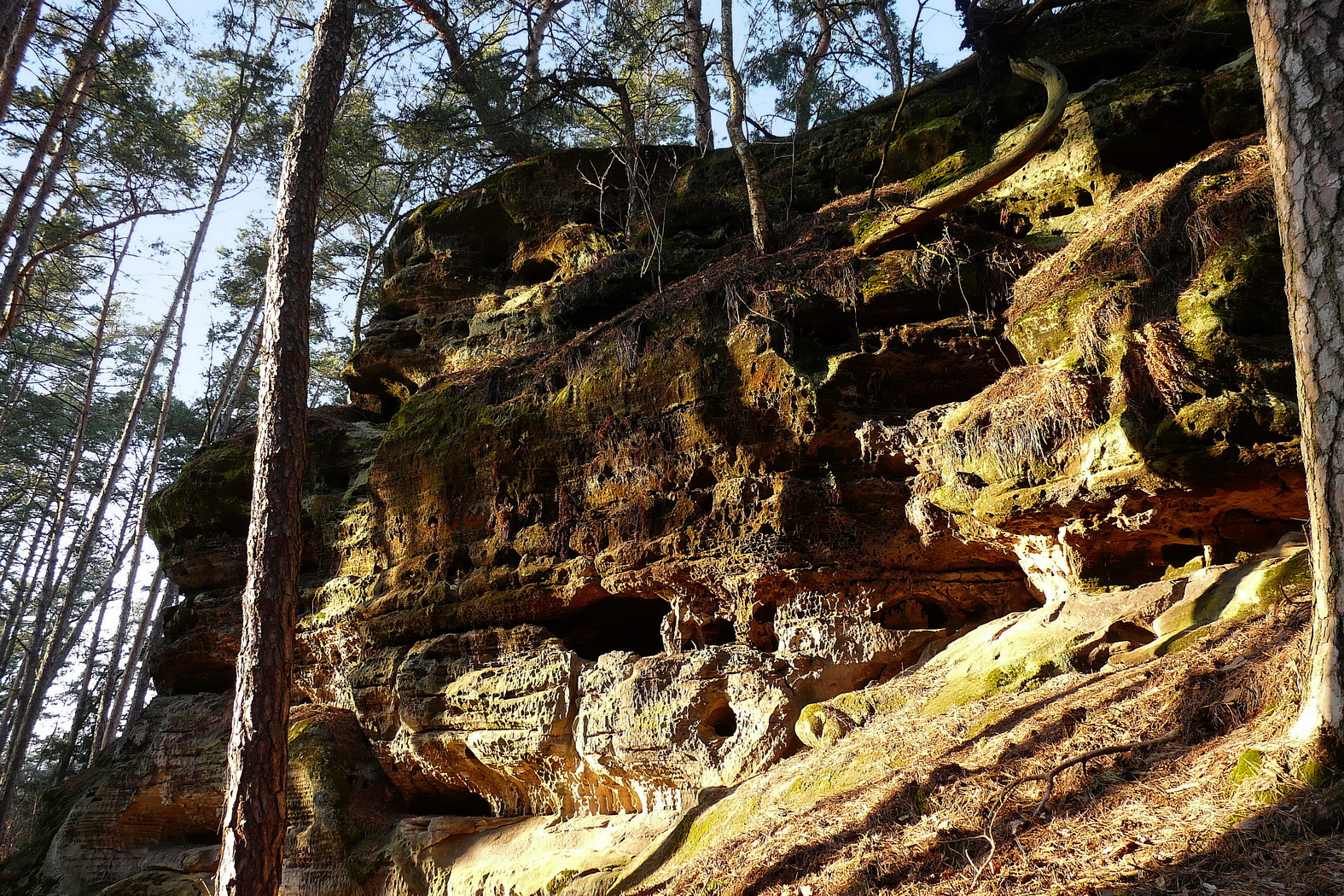 Skála na Smrkovci